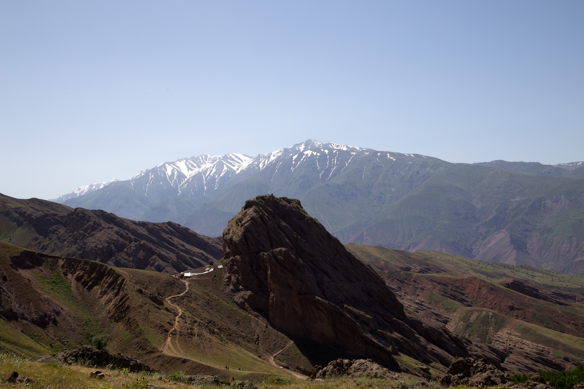 قلعه الموت -حسن صباح- خرداد1393